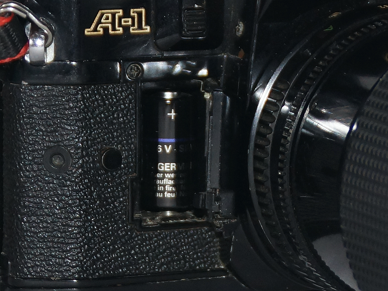 Verlorener zerbrochener Batteriefachdeckel Batteriefachklappe Canon A-1, Schwäche typisch auch für AE-1. Foto Wolfgang Pehlemann DSC04865